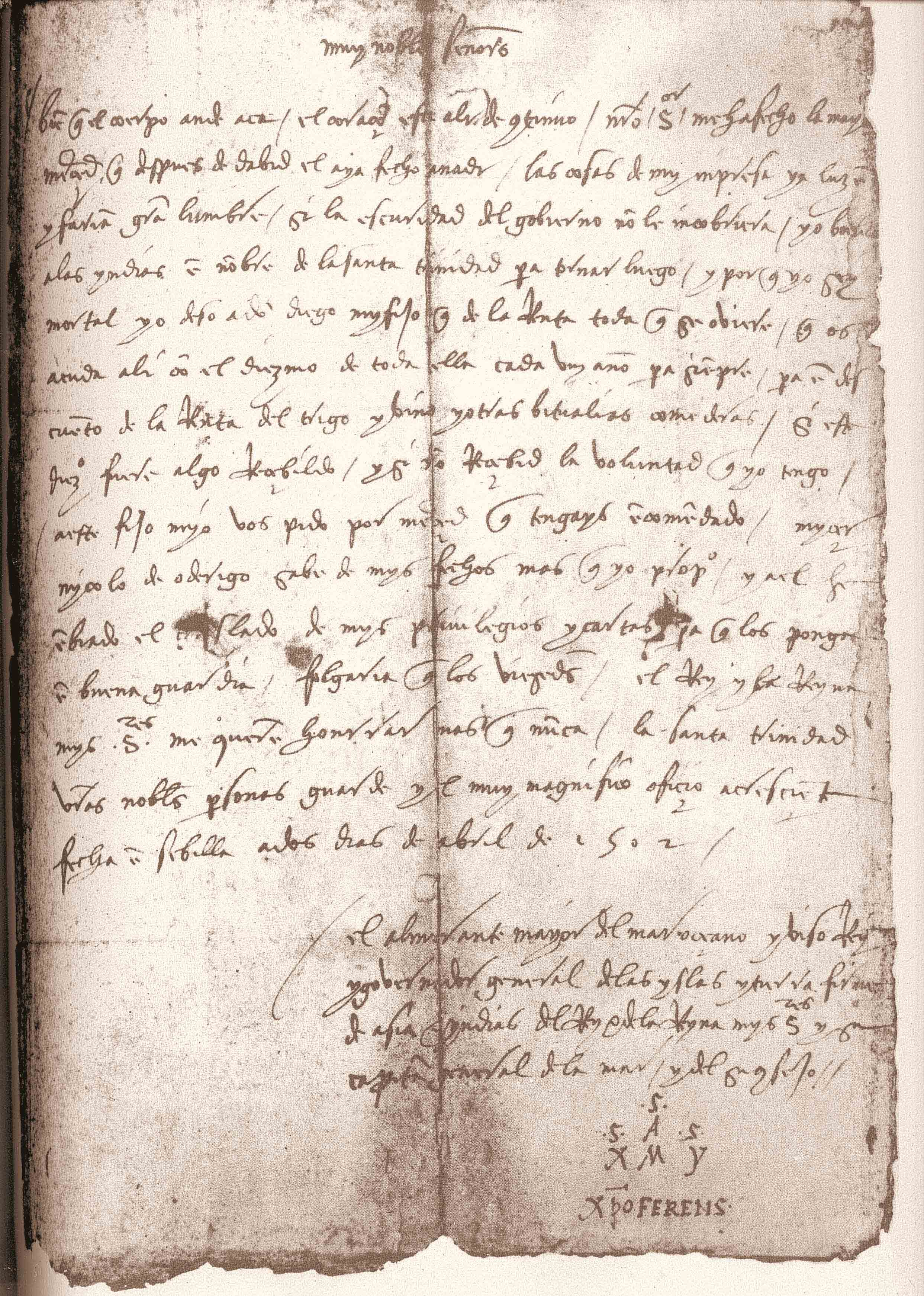 Carta de Colom de 2 d'abril de 1 502, on escriu "aunque mi cuerpo esté aquí, mi corazón esta allí de continuo". Fins fa pocs anys, alguns historiadors afirmaben que deia " aunque mi cuerpo esté aquí, mi corazón esta en Génovs"